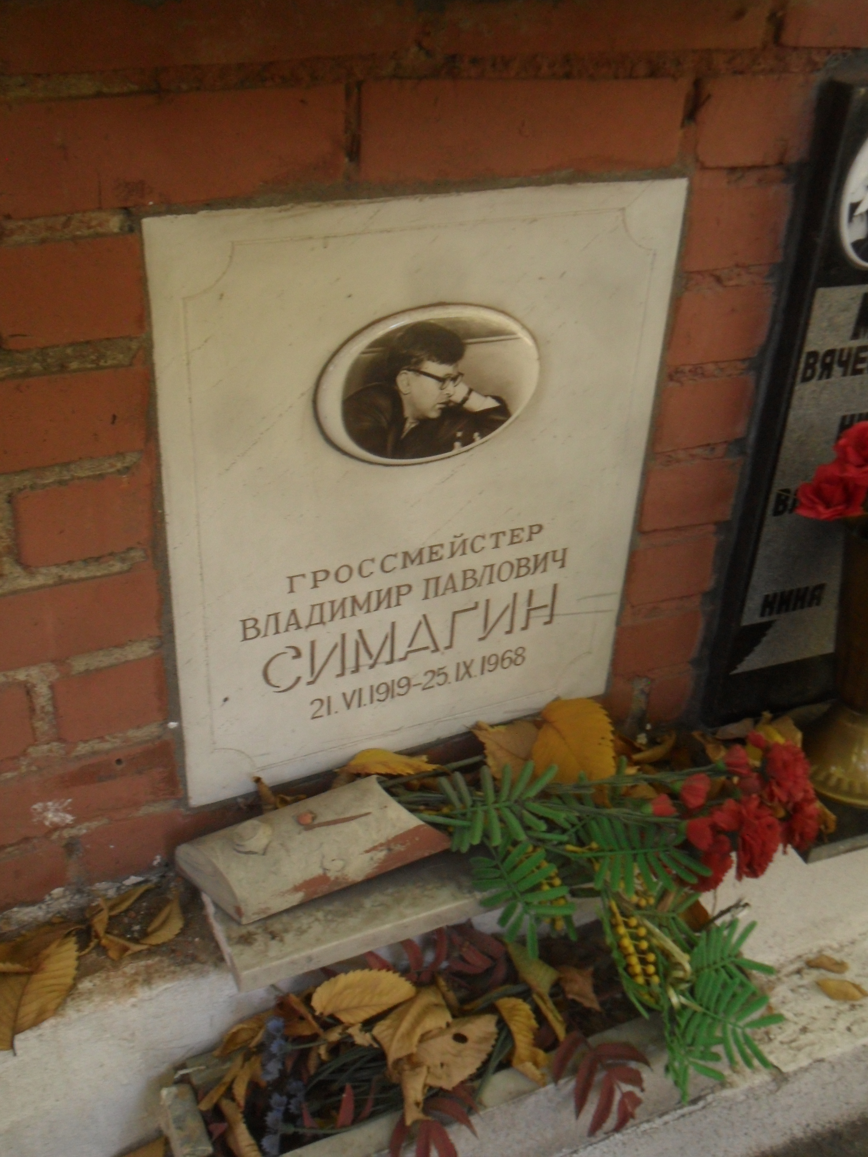 Плита колумбария шахматиста Владимира Симагина на Новодевичьем кладбище Москвы.